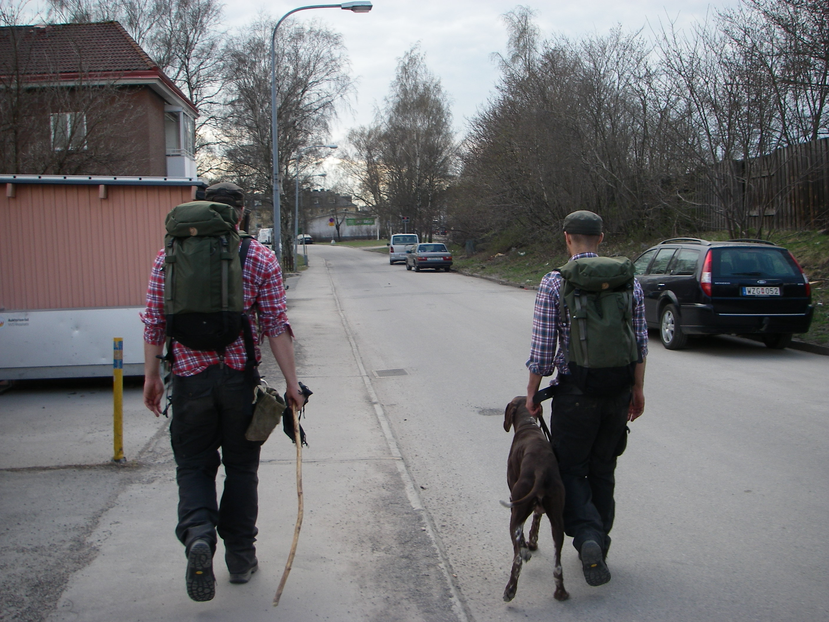 Stiko Per Larsson, hunden Yrrol och Michel Benoit under vandringsturnén 2011.